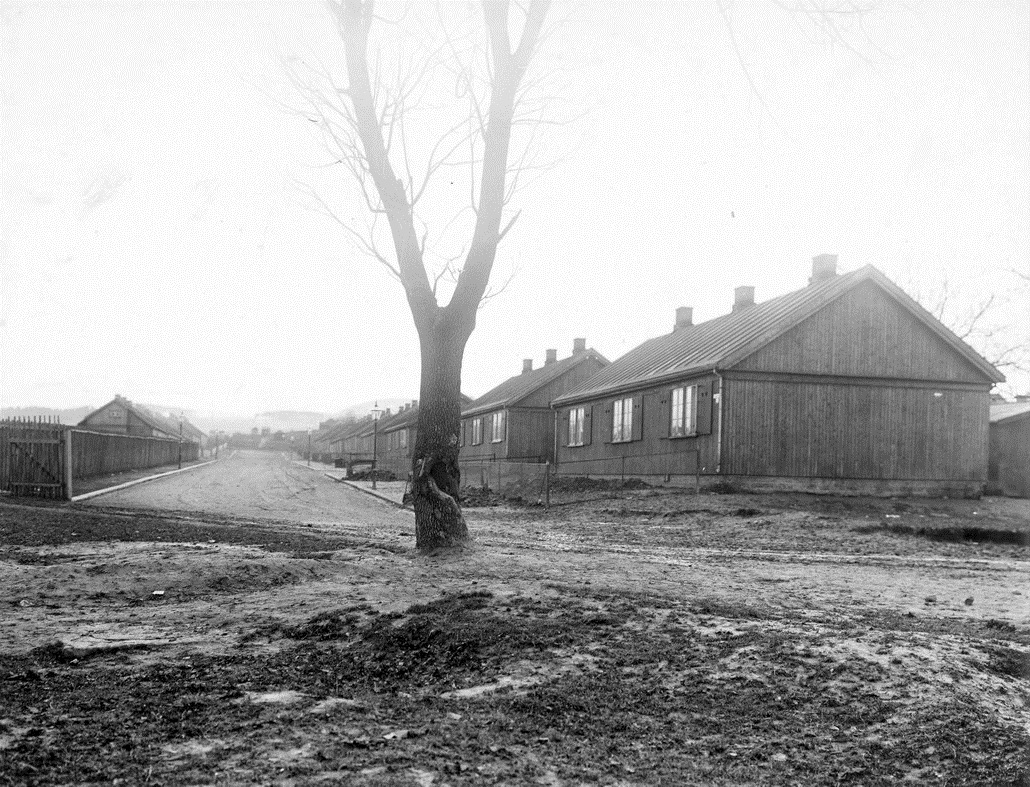 Arbeiderboliger. Brakker eller nødboliger. Sannsynligvis Arctanderbrakkene i Stavangergata, oppført vinteren 1911-12 som midlertidige nødbarakker.